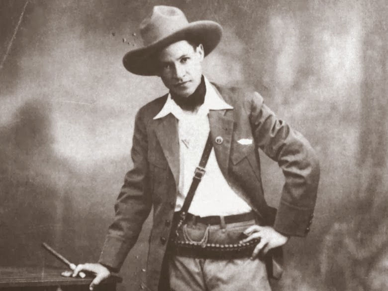 Source Fotografía propia. --txo Mayo 1988 (UTC)